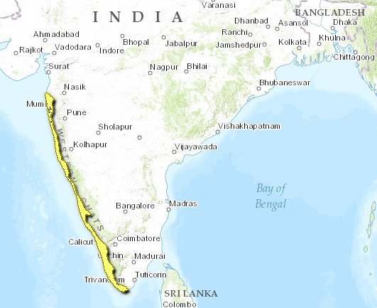 Mappa Ecoregione IM0124 - Foreste umide della costa del Malabar